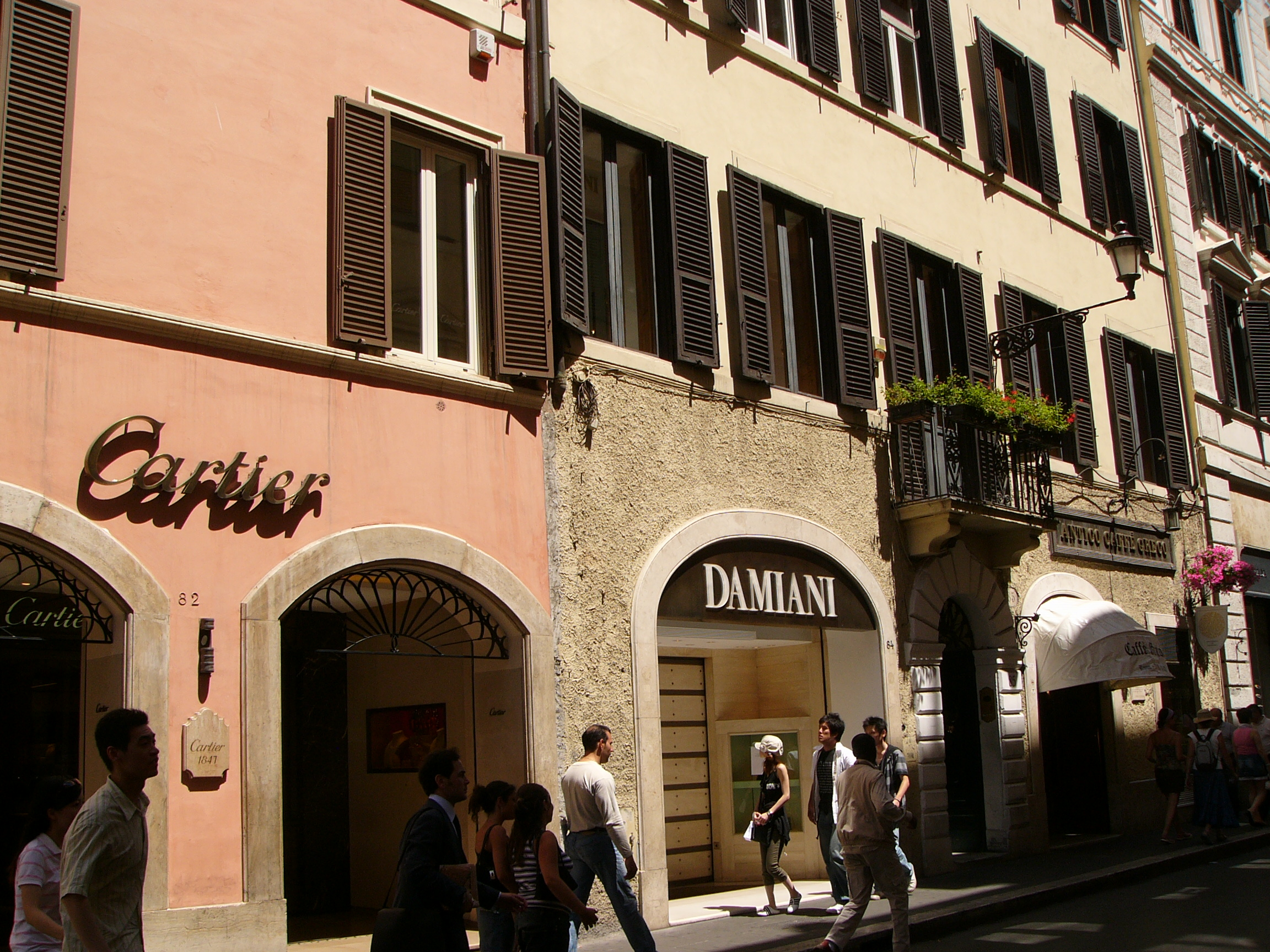 Roma, via dei Condotti e Antico Caffè Greco